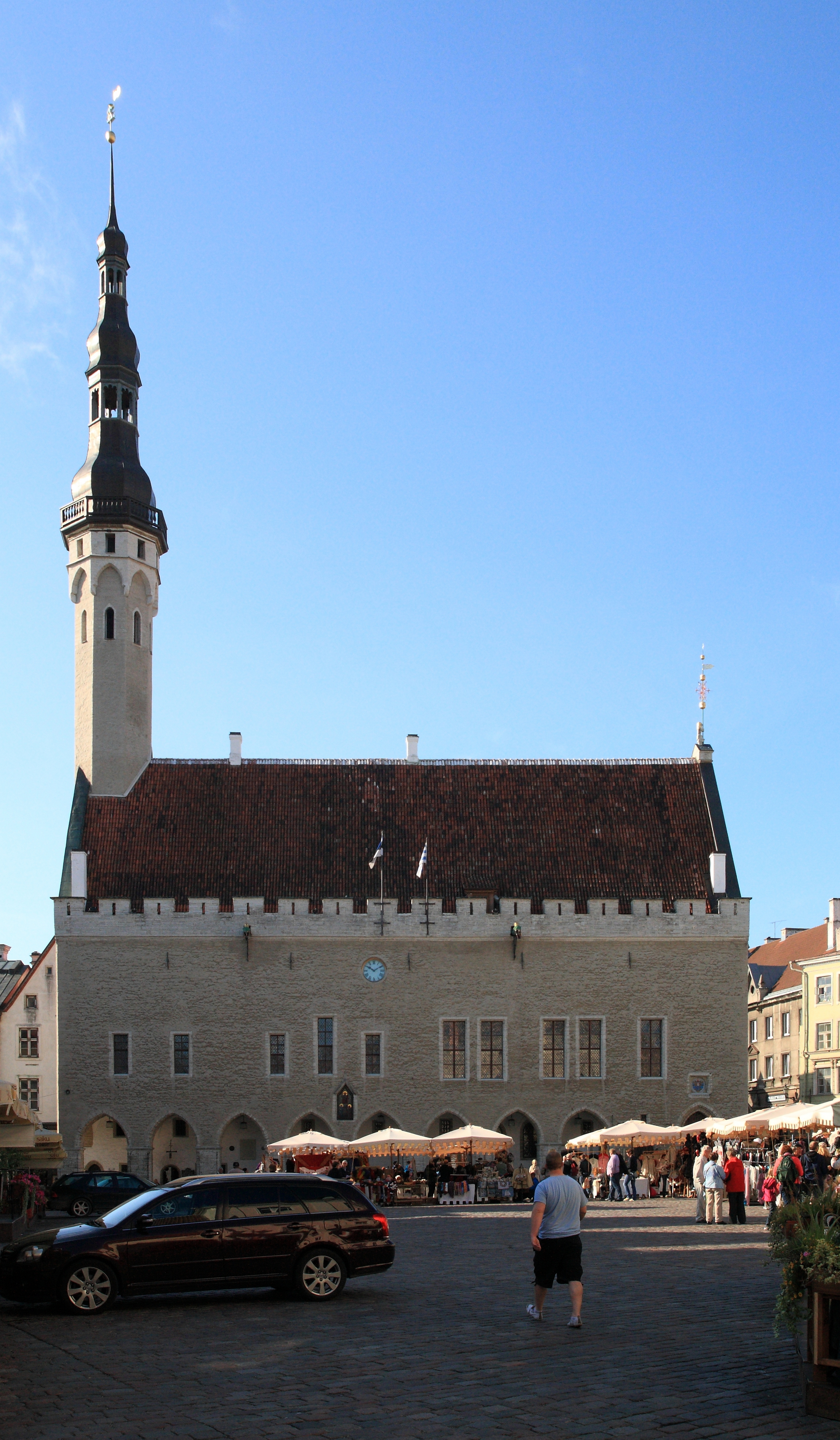 Tallinna Raekoda, 13.saj., 14.saj., 15.-20.saj